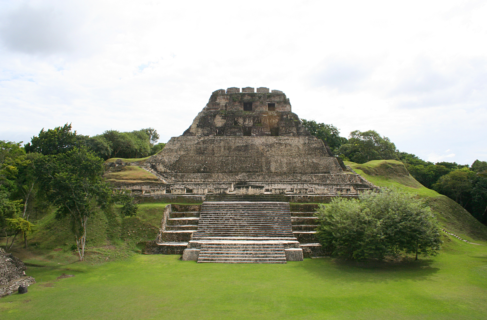 El Castillo